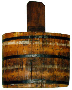 Pechpittel; ein aus Holz hergestelltes Pittel, wie es zum Harztransport im Wald verwendet wurde.